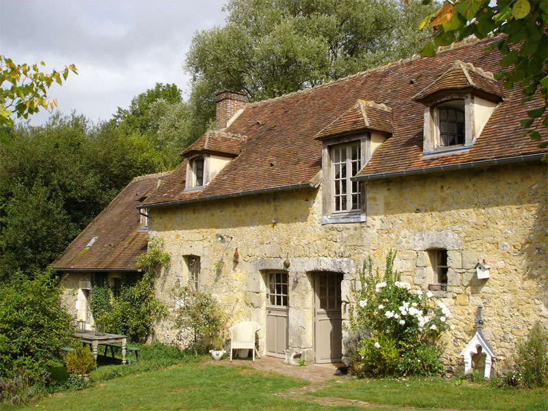 Moulin de la Pleugère du village de Saint Ouen de Sécherouvre